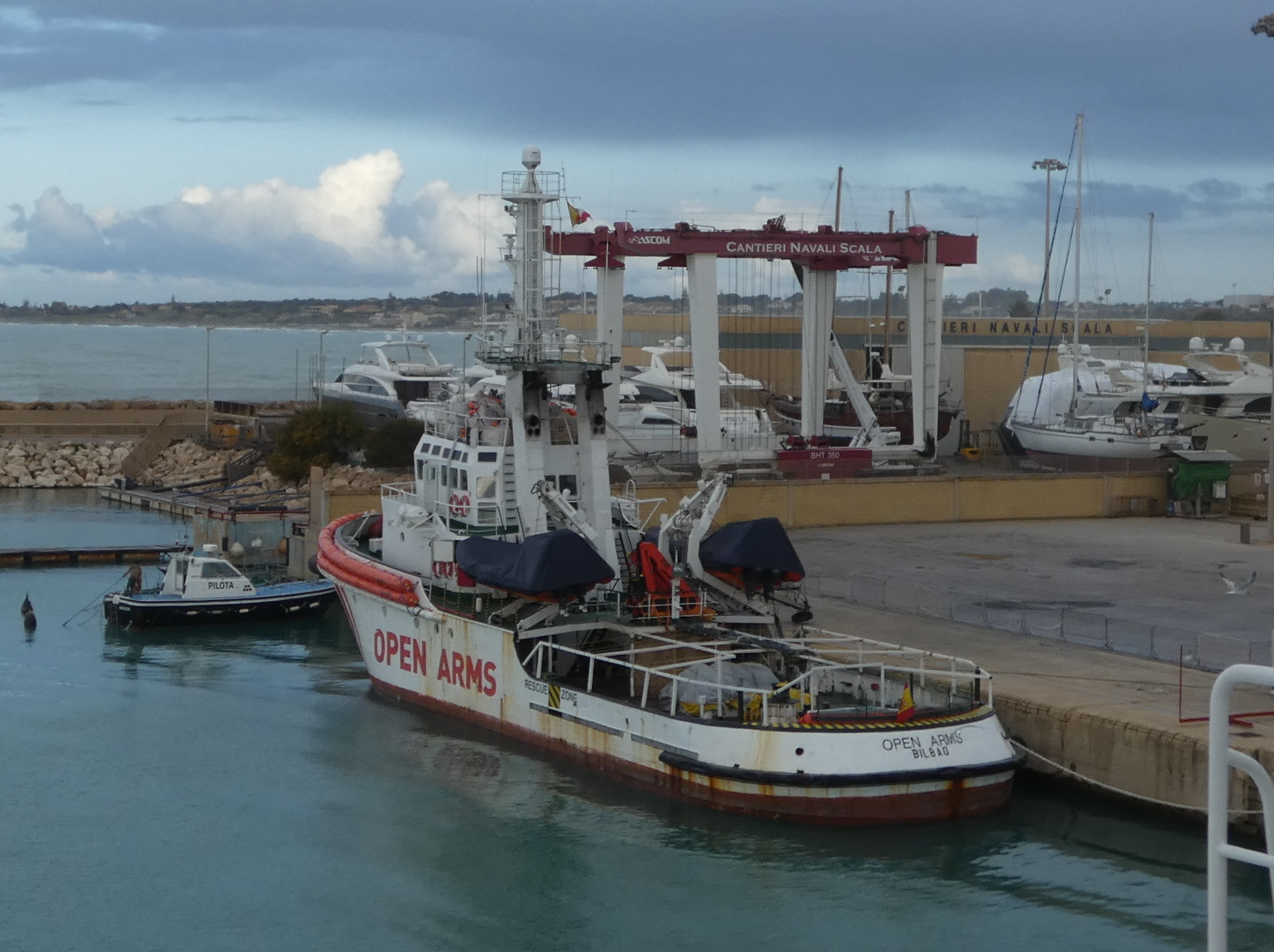 Die Open Arms in Pozzallo nach der Beschlagnahme durch die italienische Staatsanwaltschaft